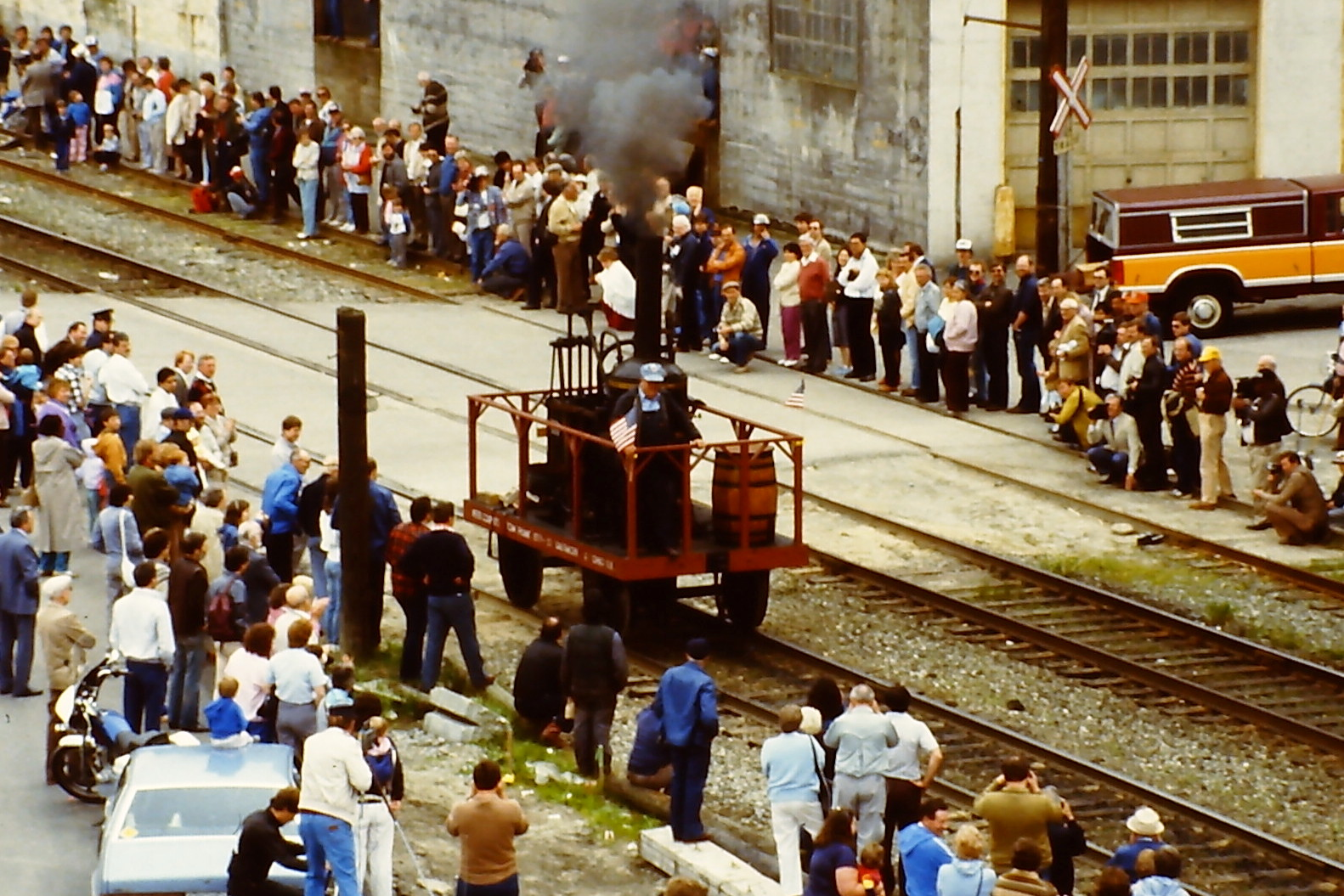 Dampflokomotive Tom Thumb auf der SteamExpo 86